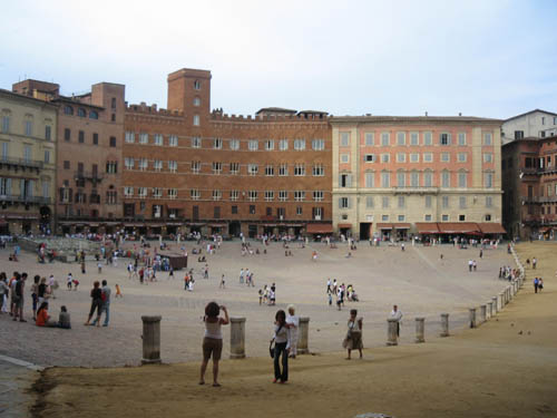 Пьяцца-дель-Кампо в Сиене